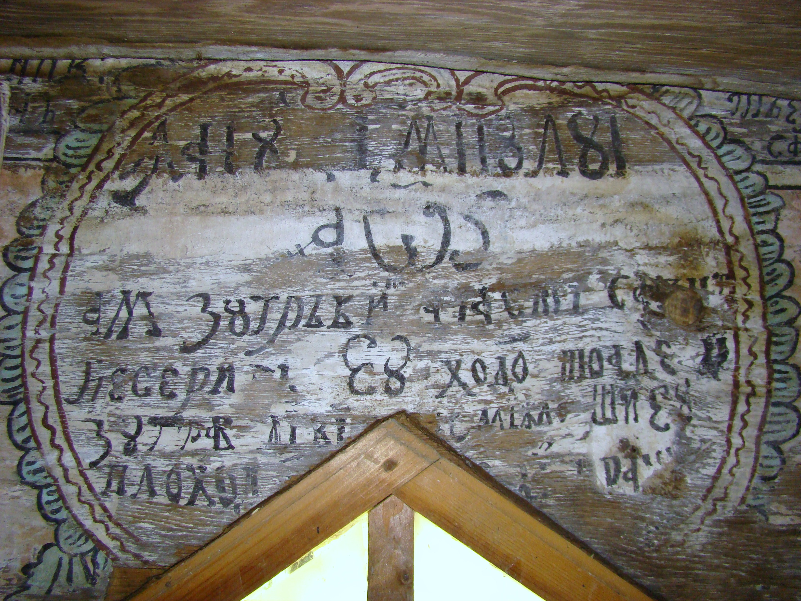 Biserica de lemn "Intrarea Maicii Domnului în Biserică" , sat BÂRSANA